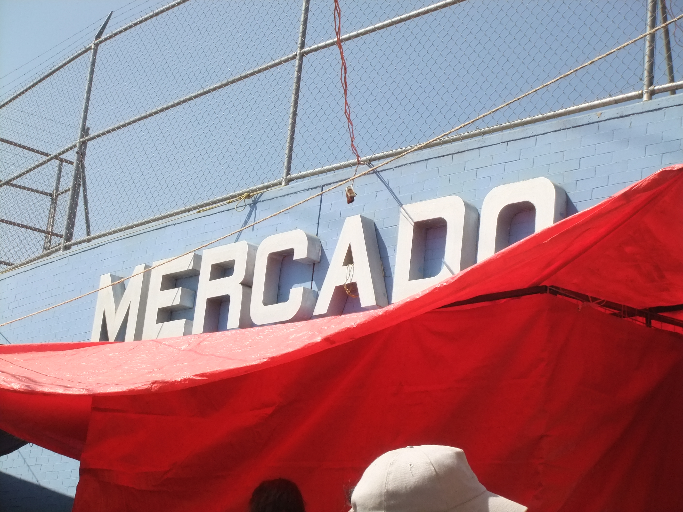 El mercado más grande de la Colonia Ajusco, conocido coloquialmente como el "Mercado de la Bola"